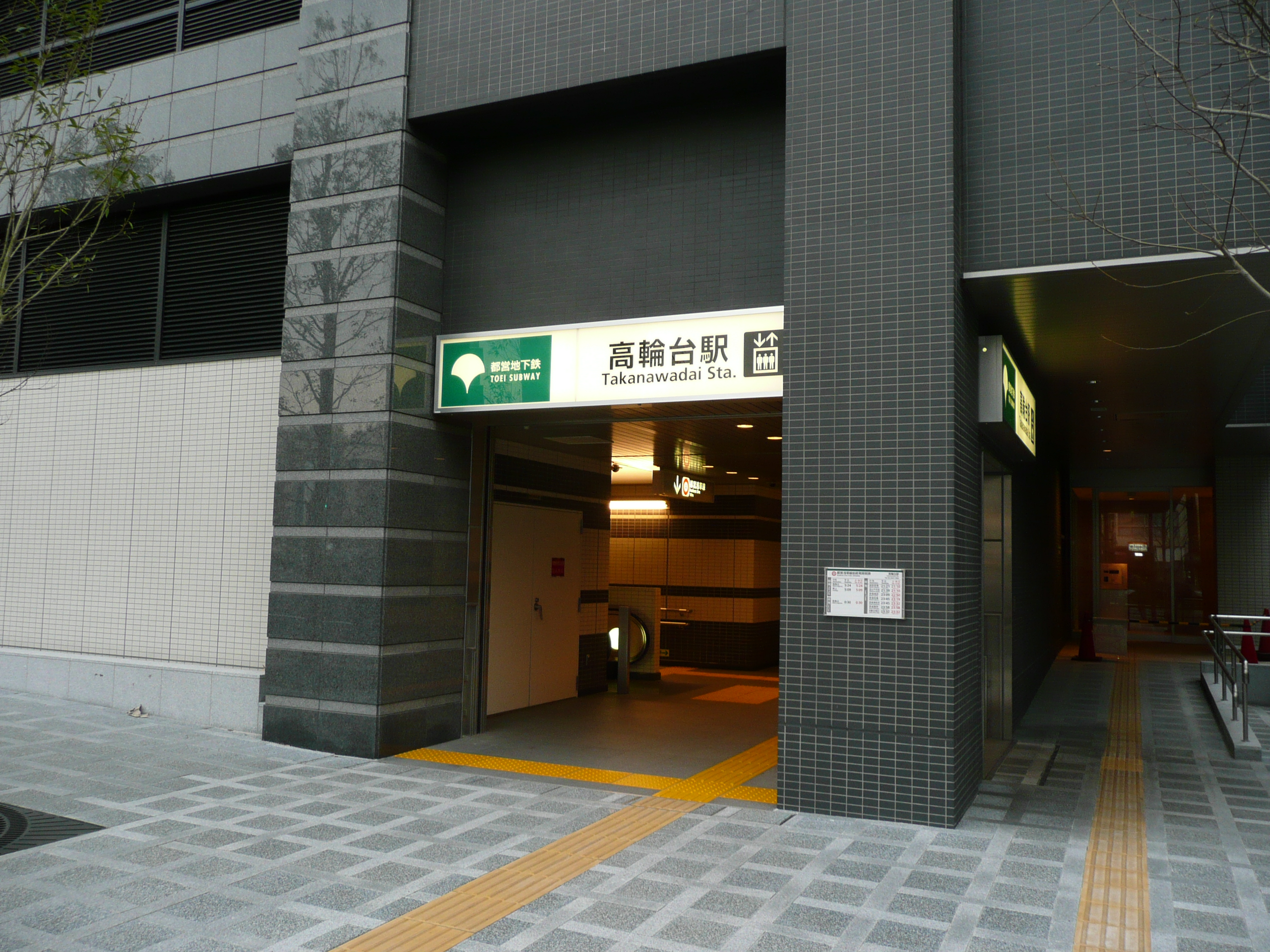 高輪台駅A1出入口